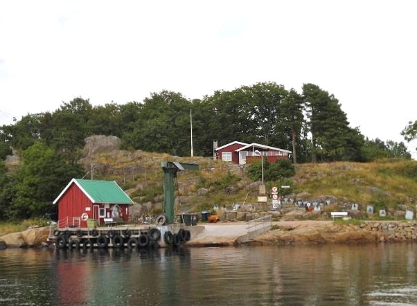 Fähranleger Veierland, Kommune Nøtterøy, Vestfold